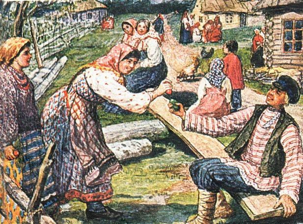 Ф. Сычков. Битки. Пасхальная дореволюционная открытка. Игра в битки, когда дети (или взрослые) стучат крашеными пасхальными яйцами одно об другое. Чьё разобьется, тот и проигравший.